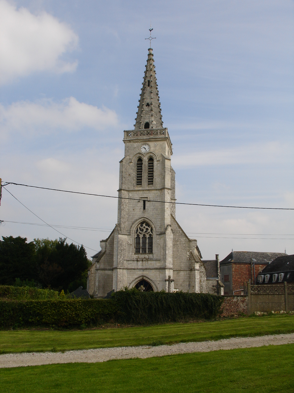 Église de Bouvelinghem